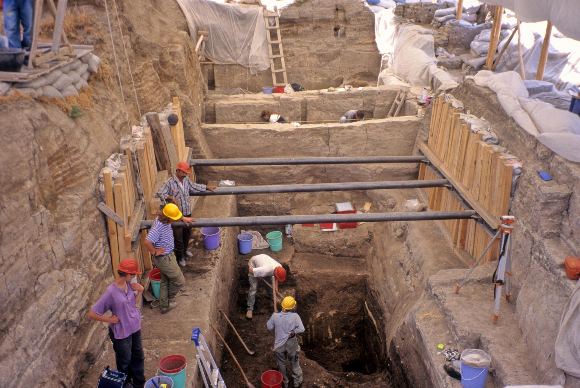 Deep trench, Catalhoyuk